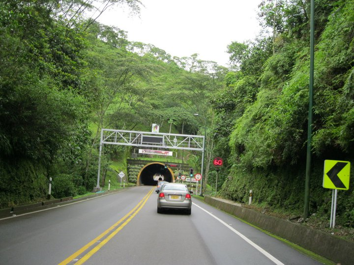 Ruta Nacional 40